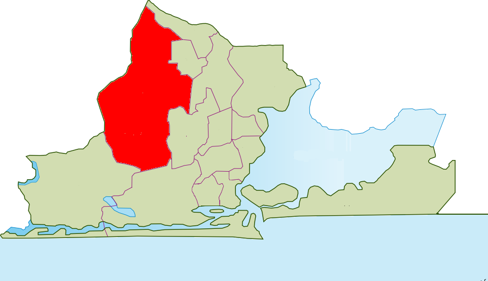 Mapa de Alimosho, Lagos